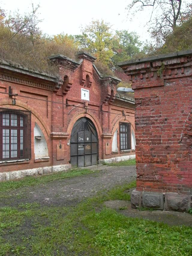 Fotografia przedstawia główne wejście do koszar Fortu III Twierdzy Modlin oraz fragment kaponiery szyjowej.